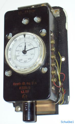 Vorsatzgebührenanzeiger GbAnz55K ohne Deckel